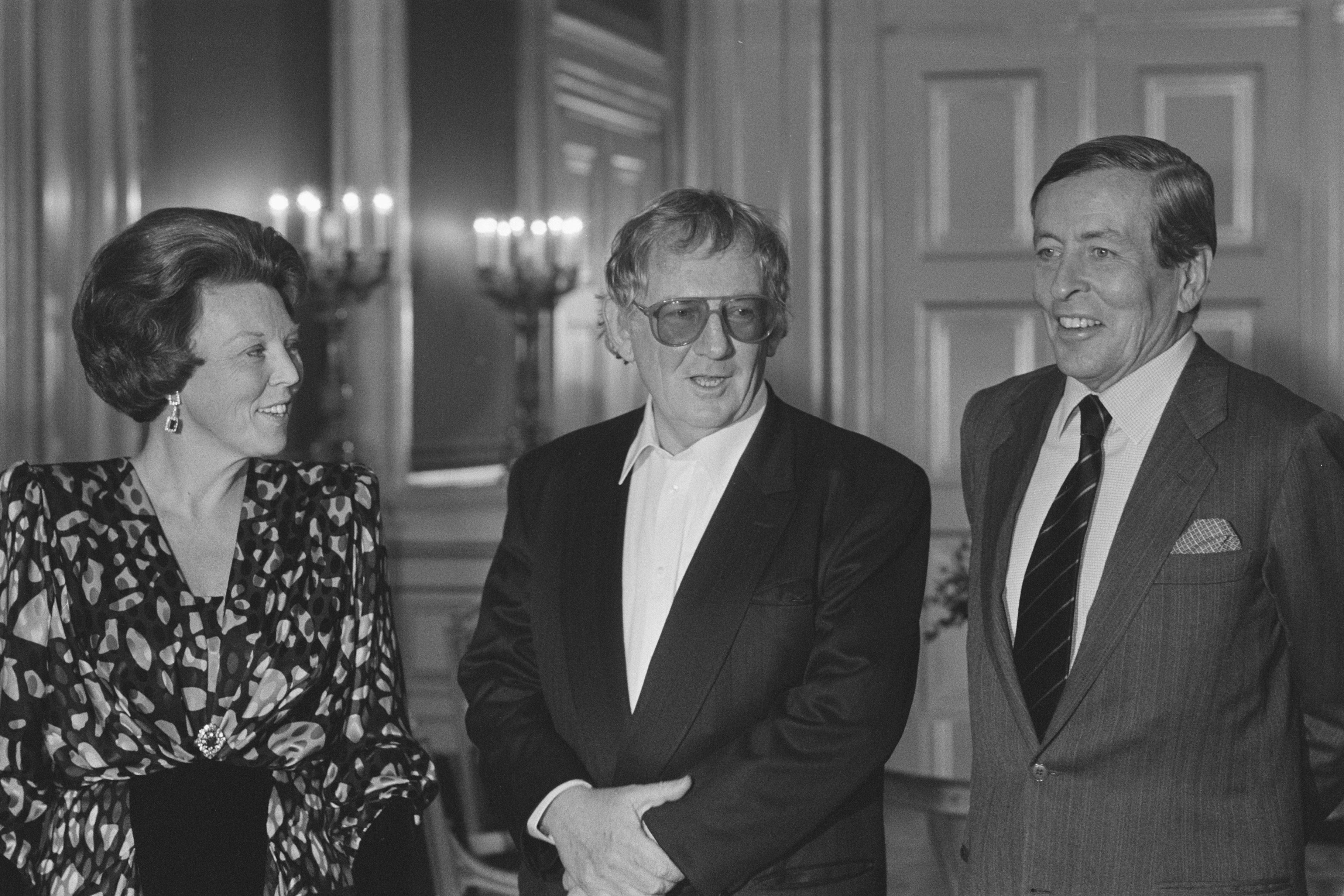 Hugo Claus krijgt de Prijs der Nederlandse Letteren uit handen van Koningin Beatrix in Den Haag ; vlnr: koningin Beatrix, Hugo Claus, prins Claus Datum 14 november 1986 Locatie Den Haag, Zuid-Holland